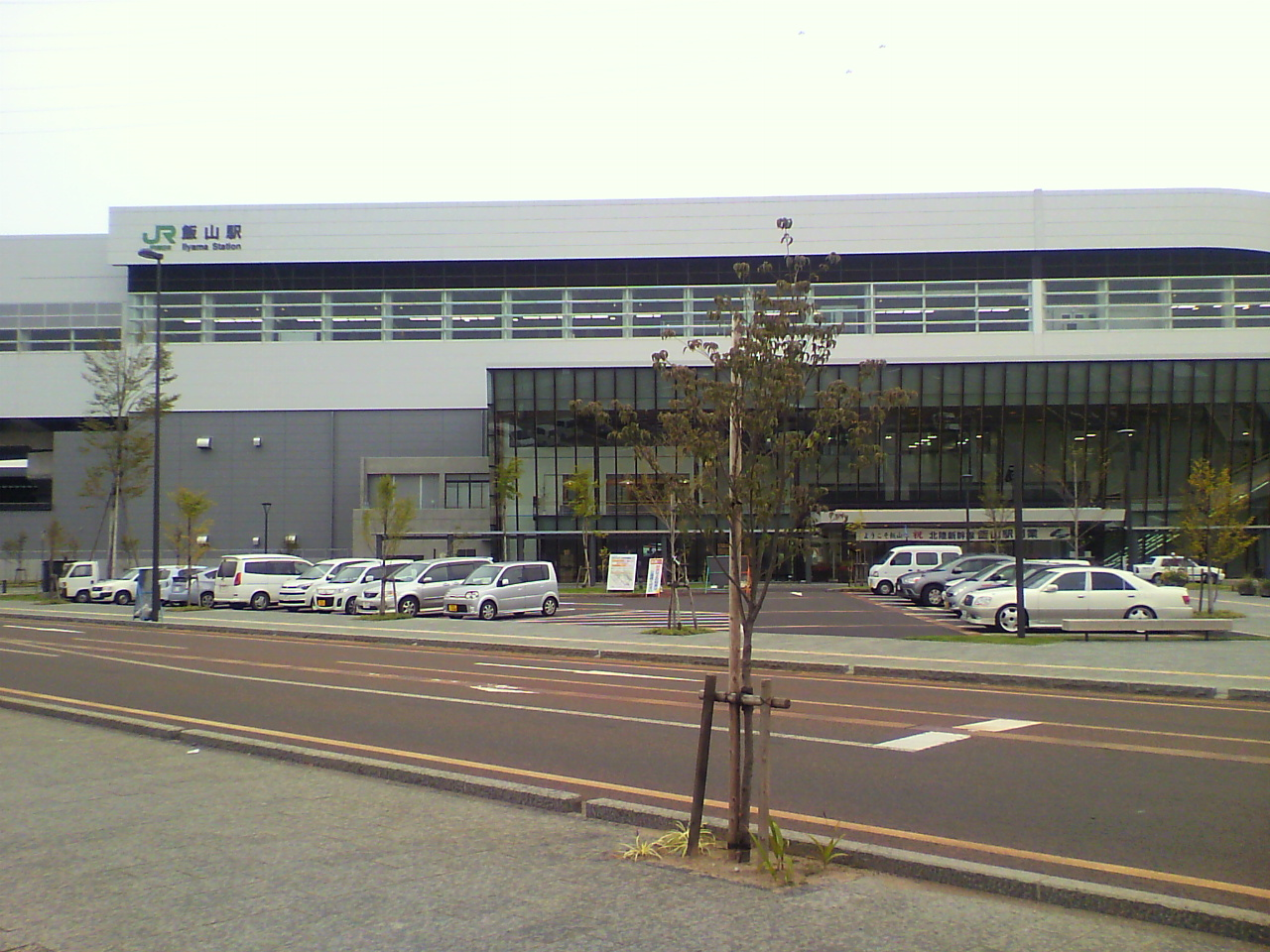 飯山駅千曲川口